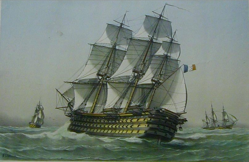 Vaisseau à Trois-Ponts la Bretagne courant au plus près Babord-amures